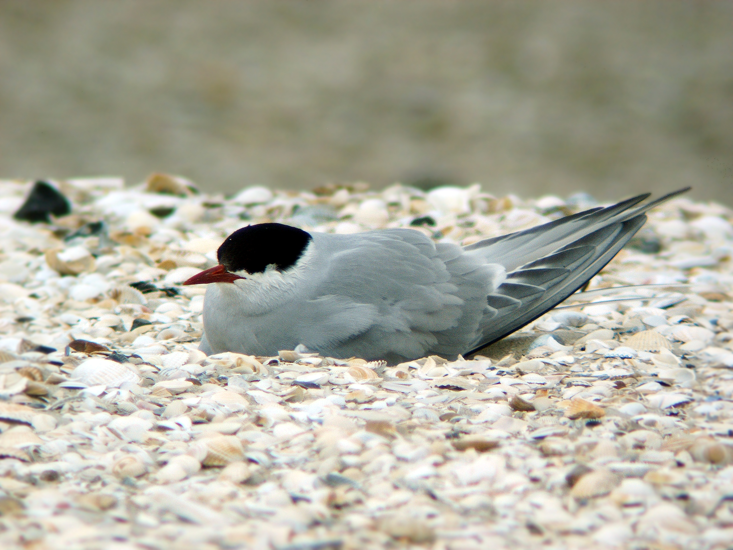 Brütende Küstenseeschwalbe (Sterna paradisaea) auf dem Amrumer Kniepsand